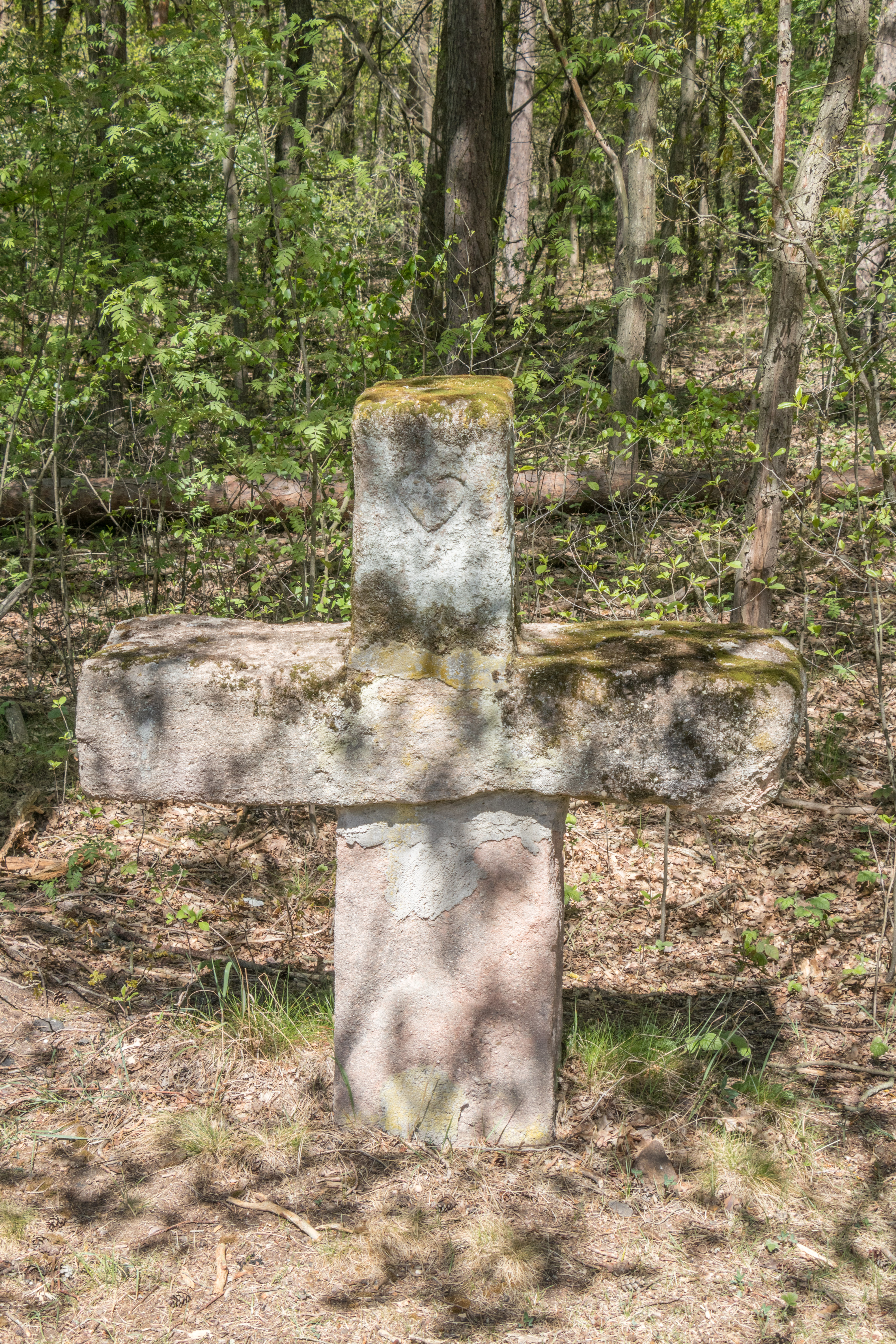 Steinkreuz, Ebersbach, Abenberg, Vorderseite